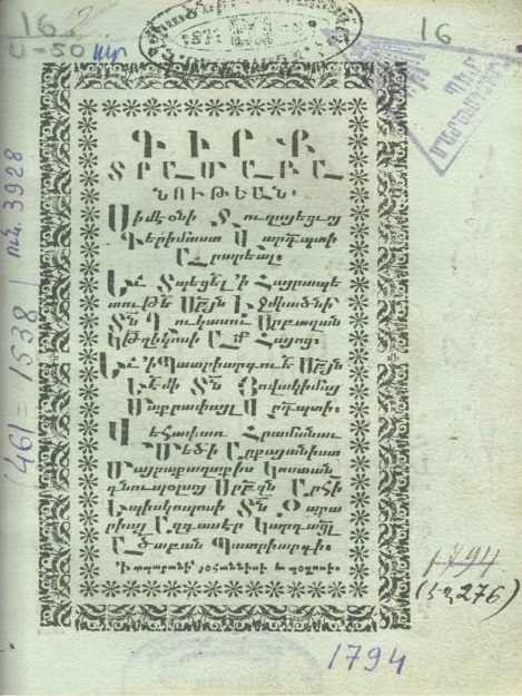 Обложка издания философского труда Симеона Джугаеци